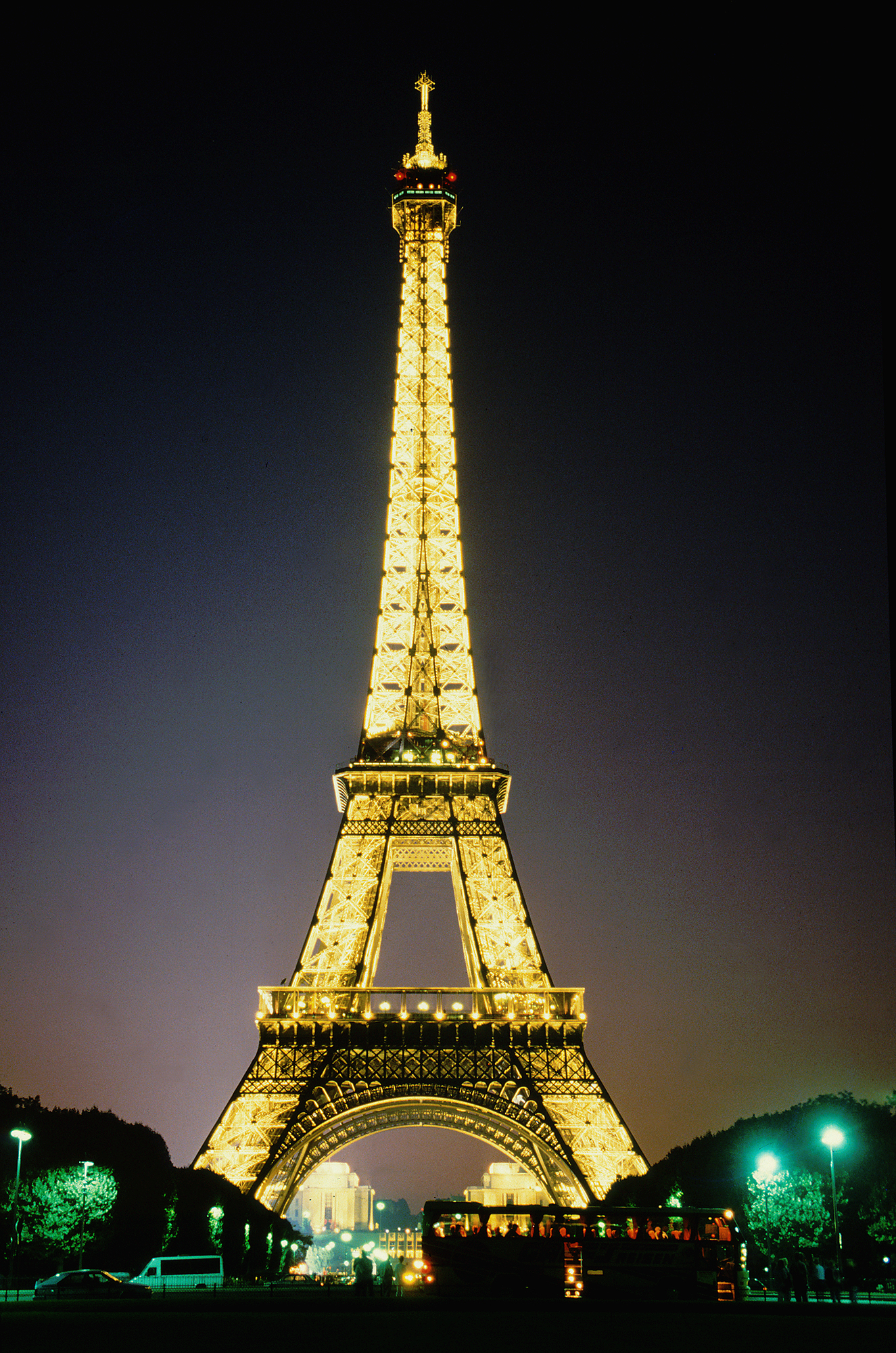 Eiffeli torn Pariisis 94